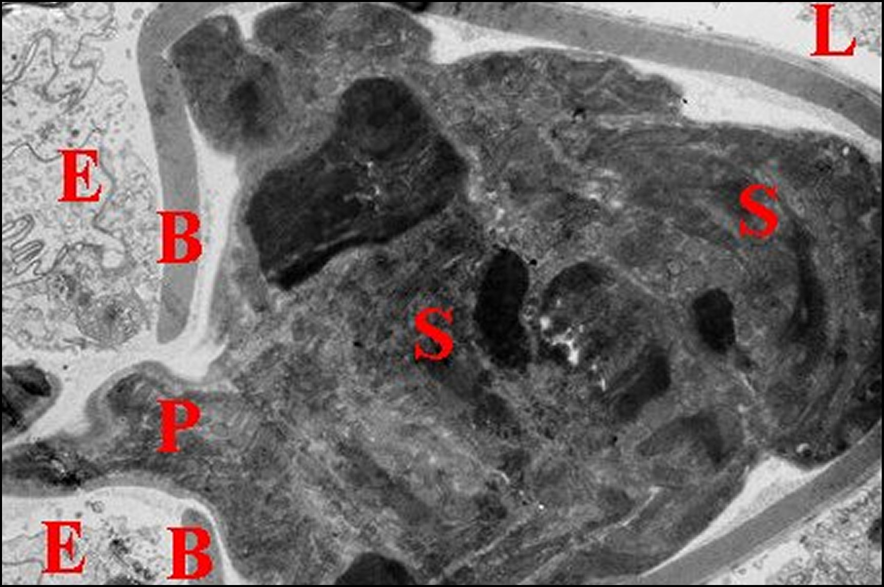 Spermatophore de Telema tenella dans le canal déférent vu en coupe transversale. Microscope électronique à transmission.